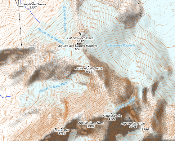 carte réalisée sur umap This map may be incomplete, and may contain errors. Don't rely solely on it for navigation.